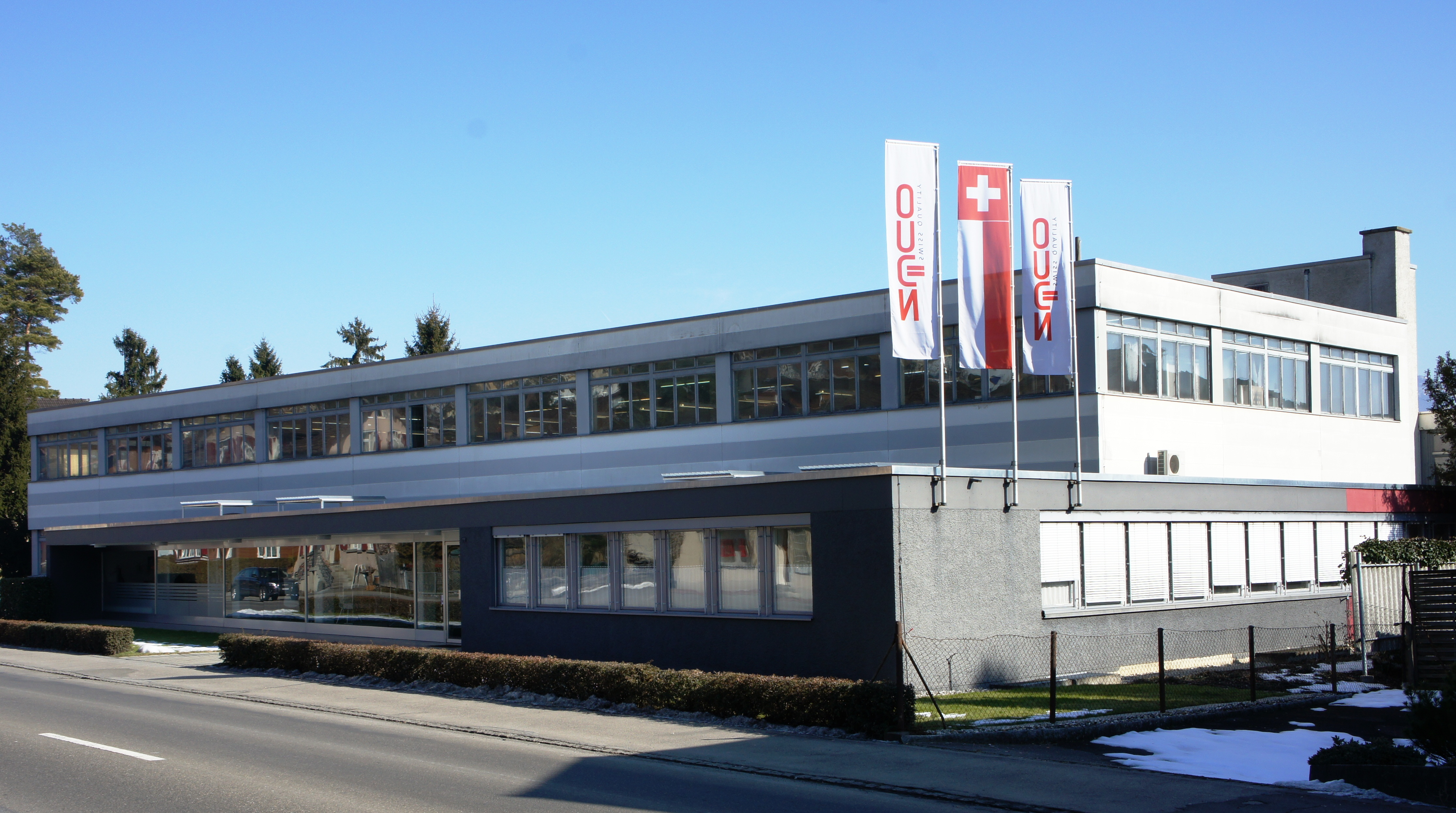 Firma Züco in Rebstein. Verwaltung, Produktion und Ausstellungsraum.